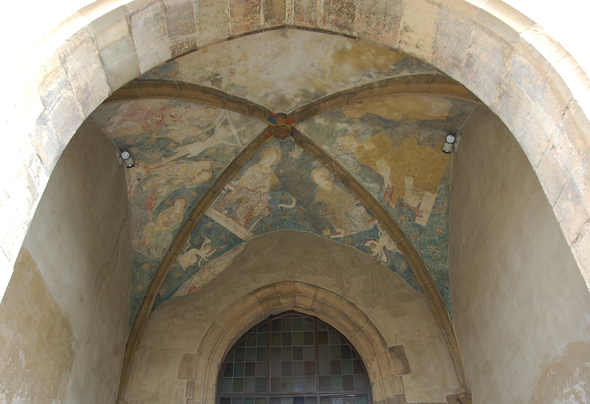 Deckenmalerei im Hauptportal der Bartholomäuskirche Markgröningen